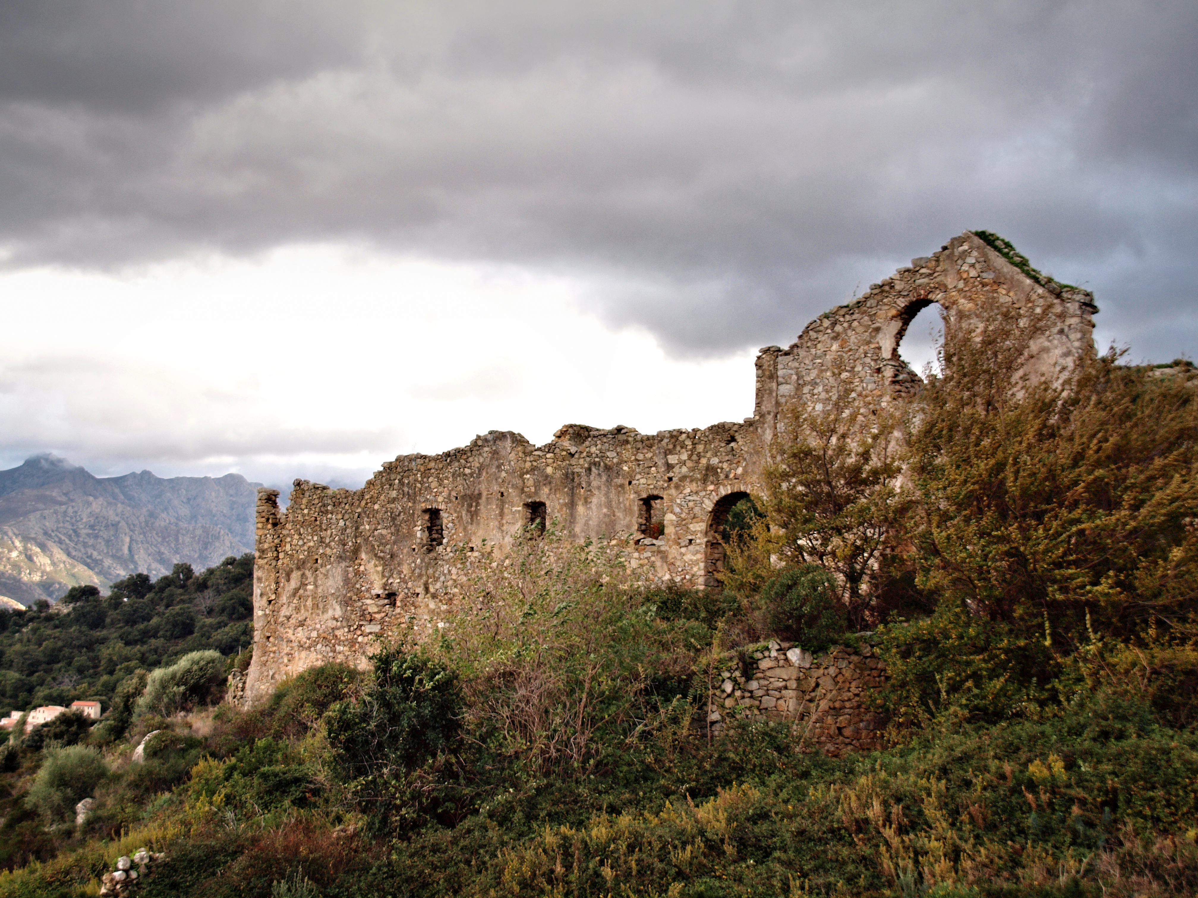 Santa-Reparata-di-Balagna (Corse) - Ruines de l'ancien couvent Sant'Angelo (Sant'Anghjulu)